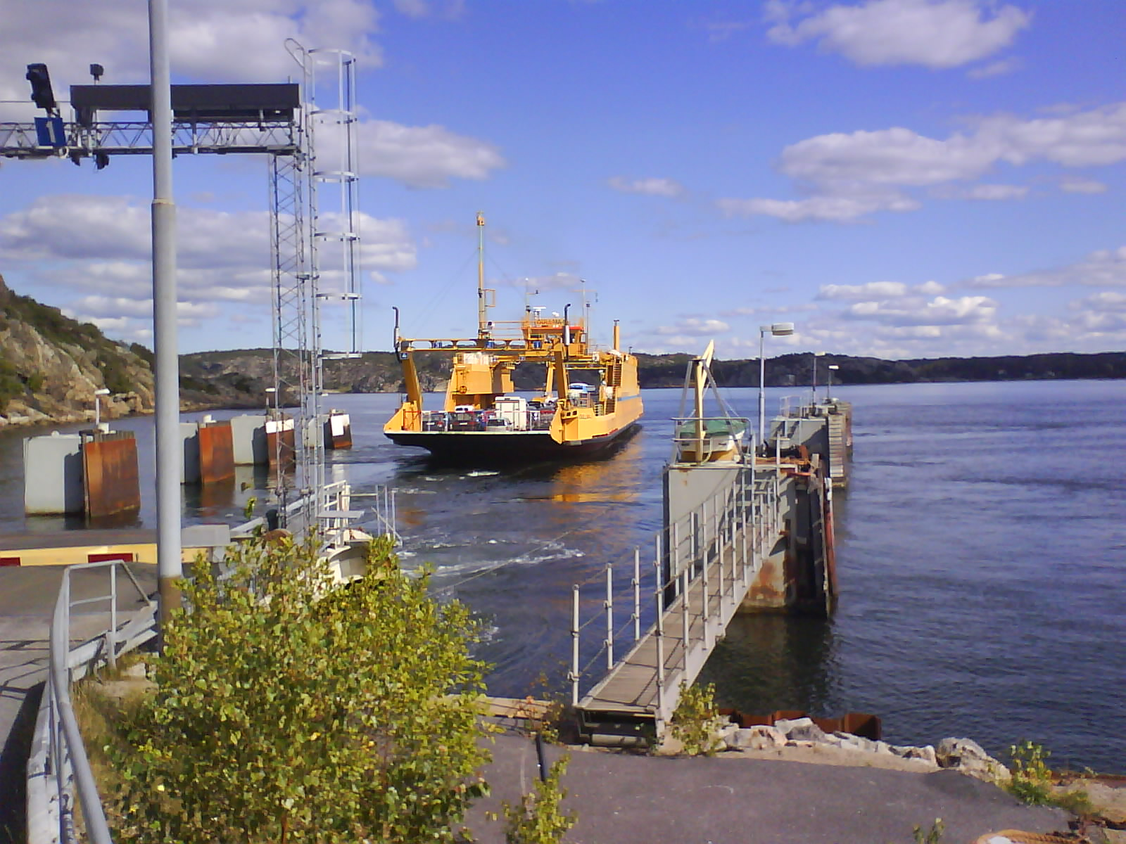 Den svenska bilfärjan M/S Gullmaj